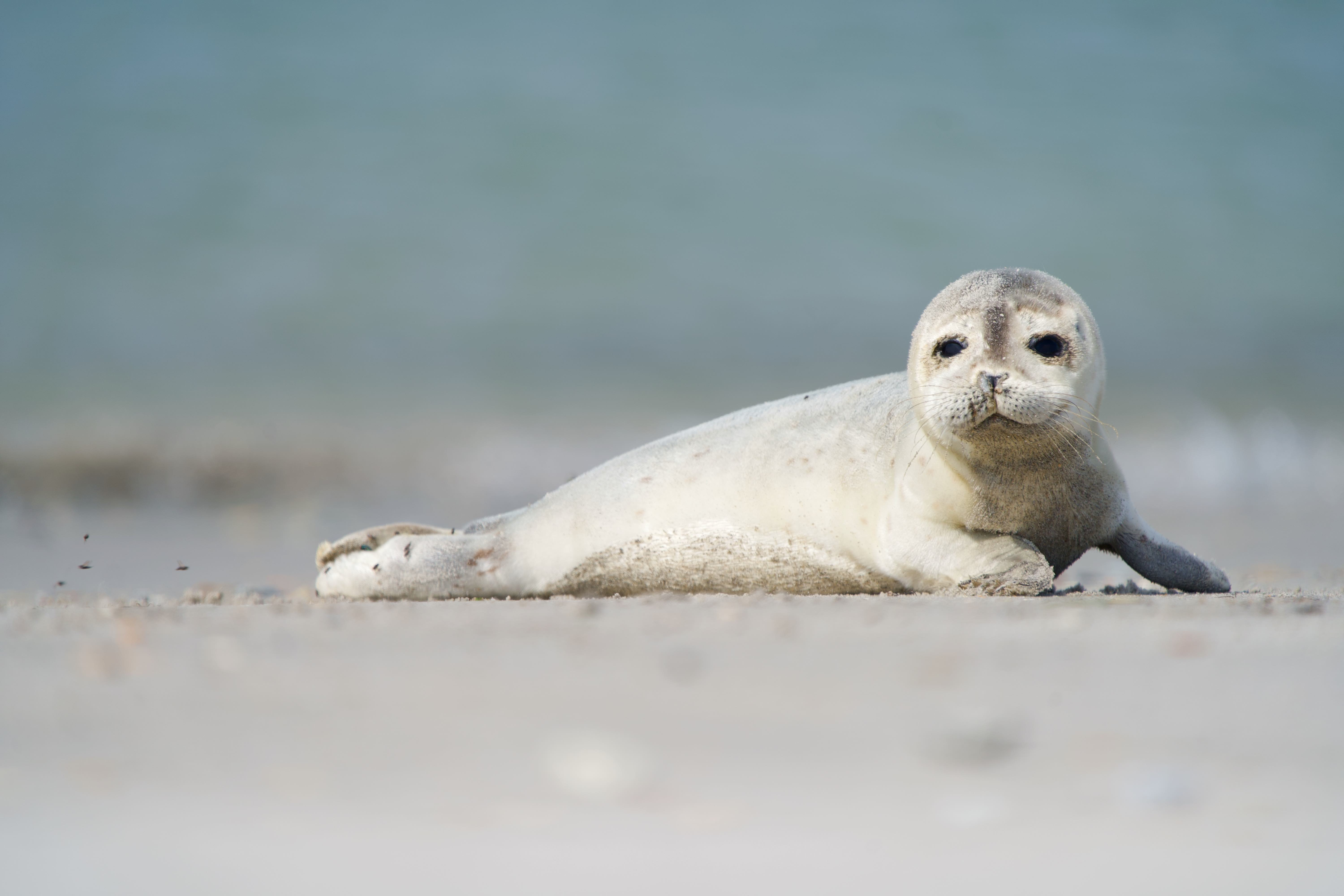 Ein Seehundjungtier im Sand der Helgoländer Düne.